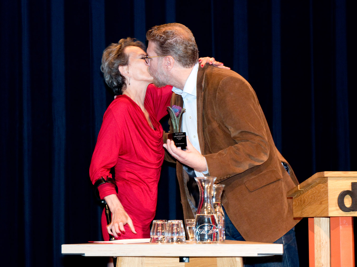 Publiciste Karin Spaink wordt door Fabian van Langevelde, voorzitter van De Vrije Gedachte, uitgeroepen tot Vrijdenker van het jaar 2015. Amsterdam, De Balie, 10 oktober 2015.